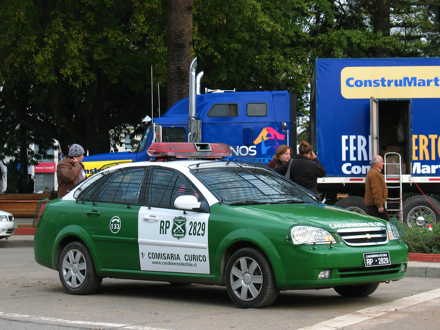 Chevrolet Optra police